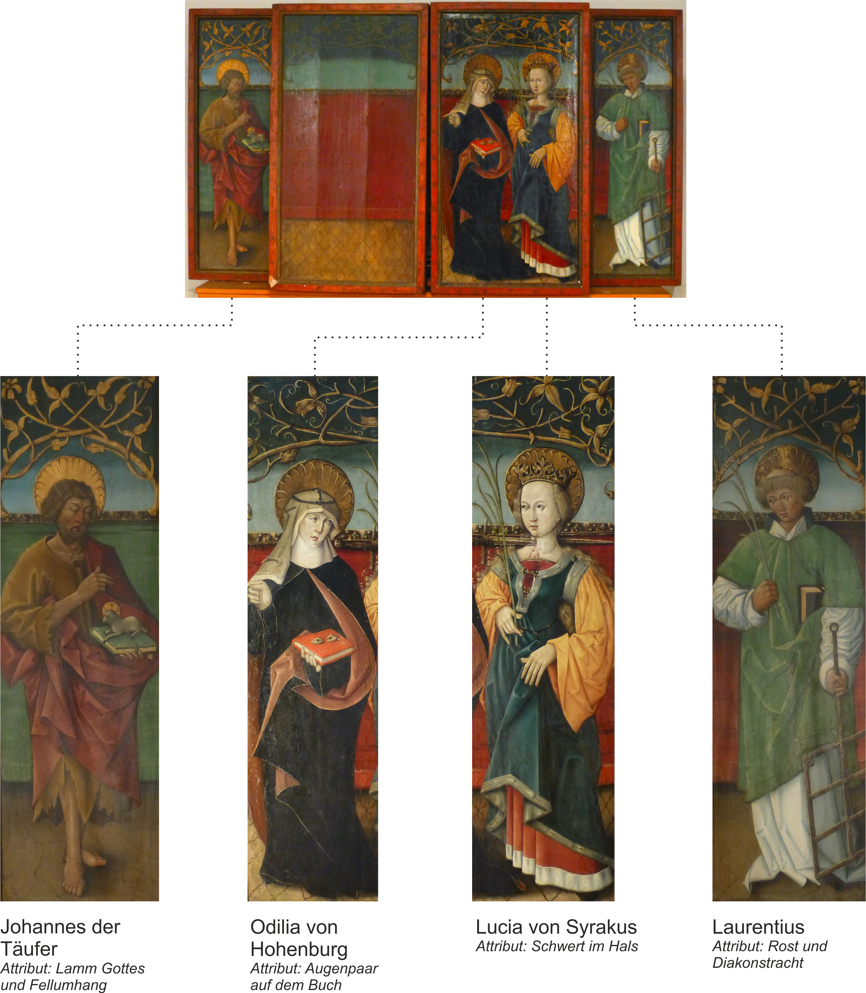 Übersicht der Gemäldedarstellungen auf der Alltagsseite des Tinzer Flügelaltars von 1497